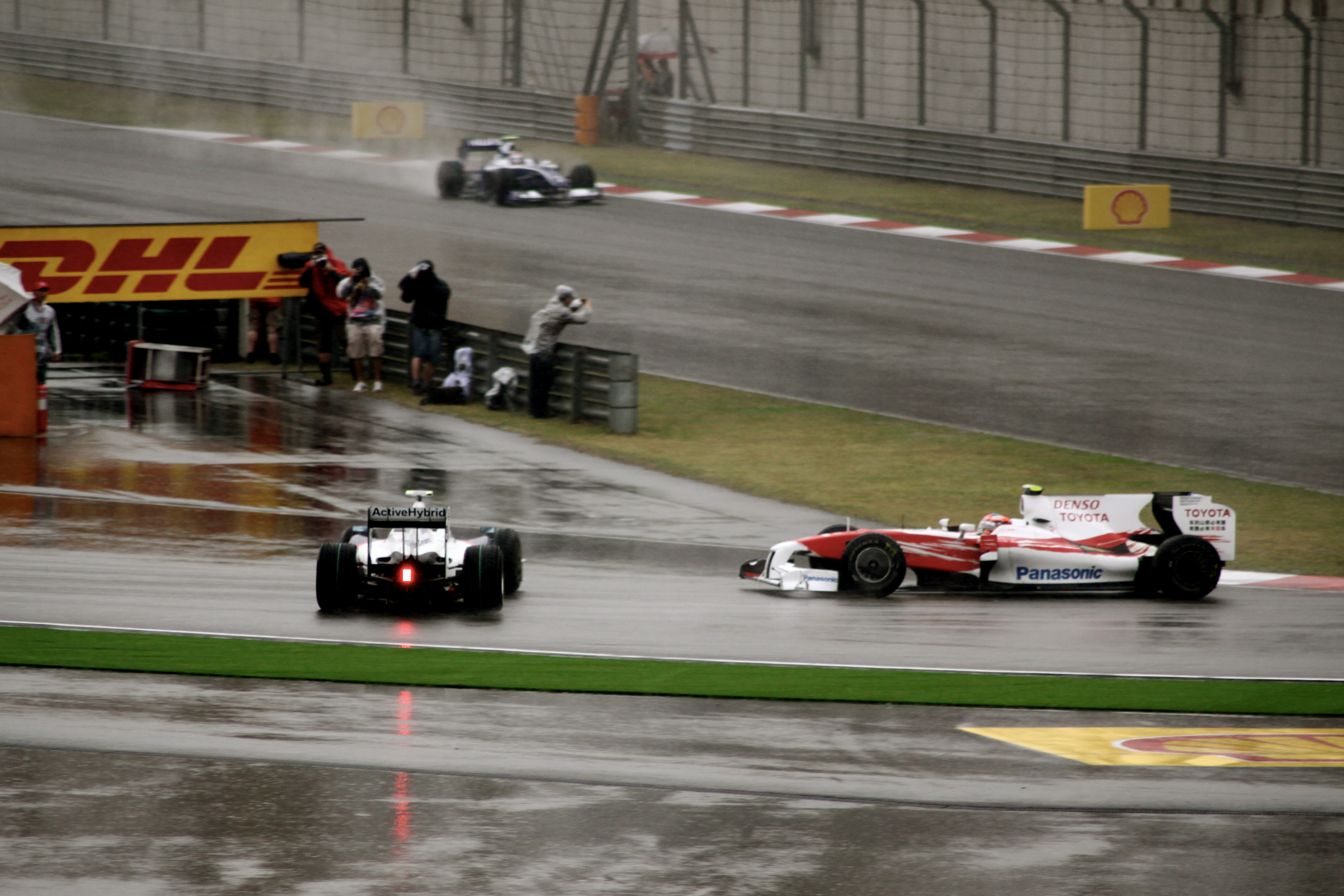 BMW Sauber spin China 09